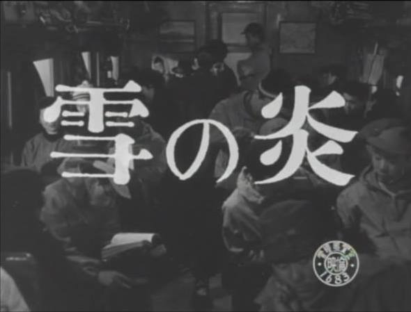 『雪の炎』、1955年、カットタイトル